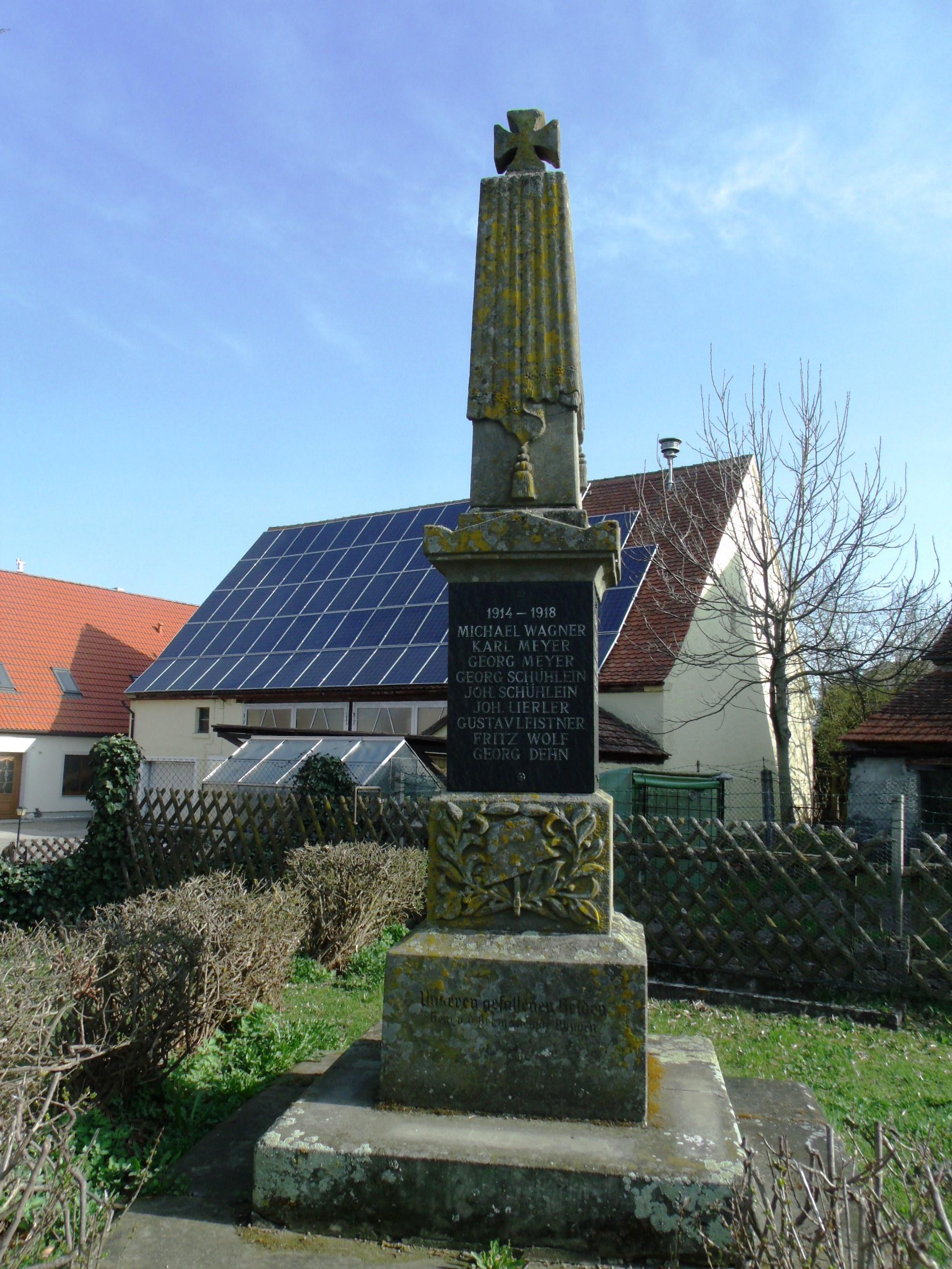 Winden, Ortsteil von Leutershausen im mittelfränkischen Landkreis Ansbach, Kriegerdenkmal